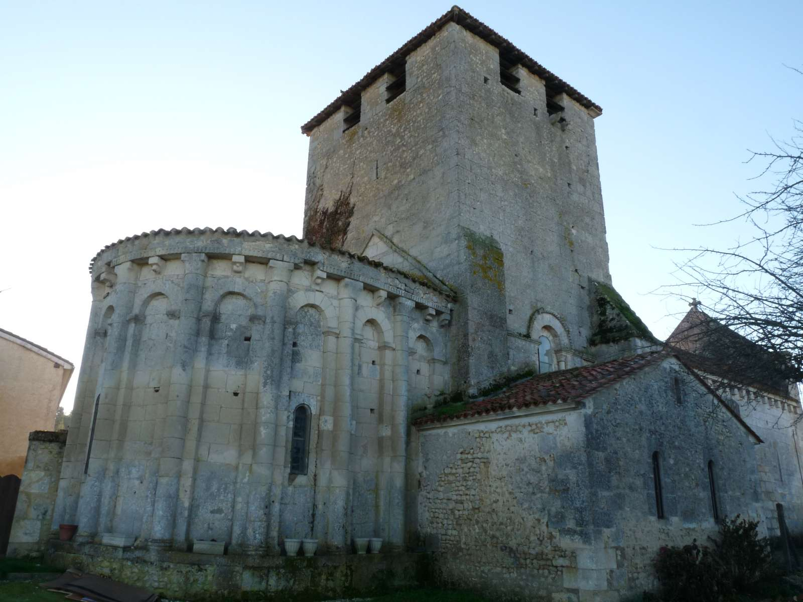 église de Champagne-Vigny (Champagne-de-Blanzac), Charente, France